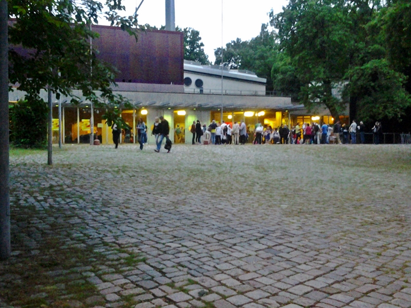 Horst-Korber-Zentrum Sport